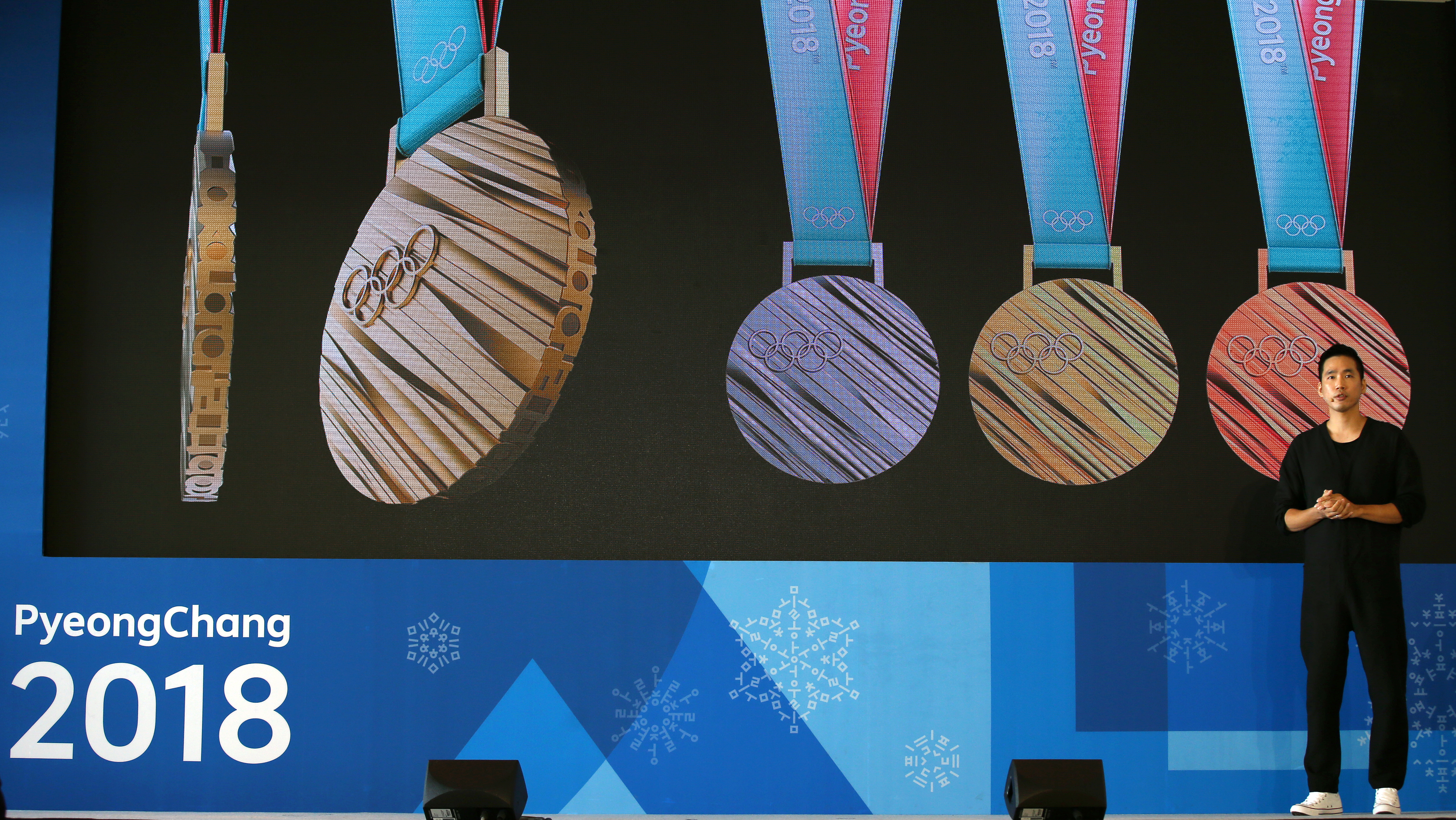 Образцы олимпийских медалей XXIII Олимпийских зимних игр 2018 в Пхёнчхане